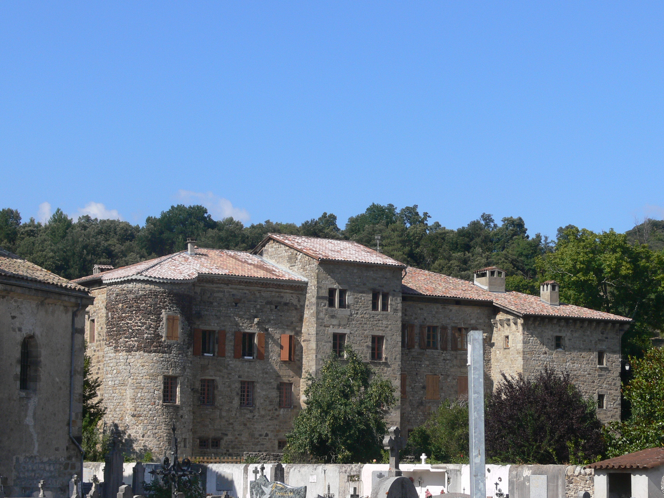 Jaujac - Château de Castreveille